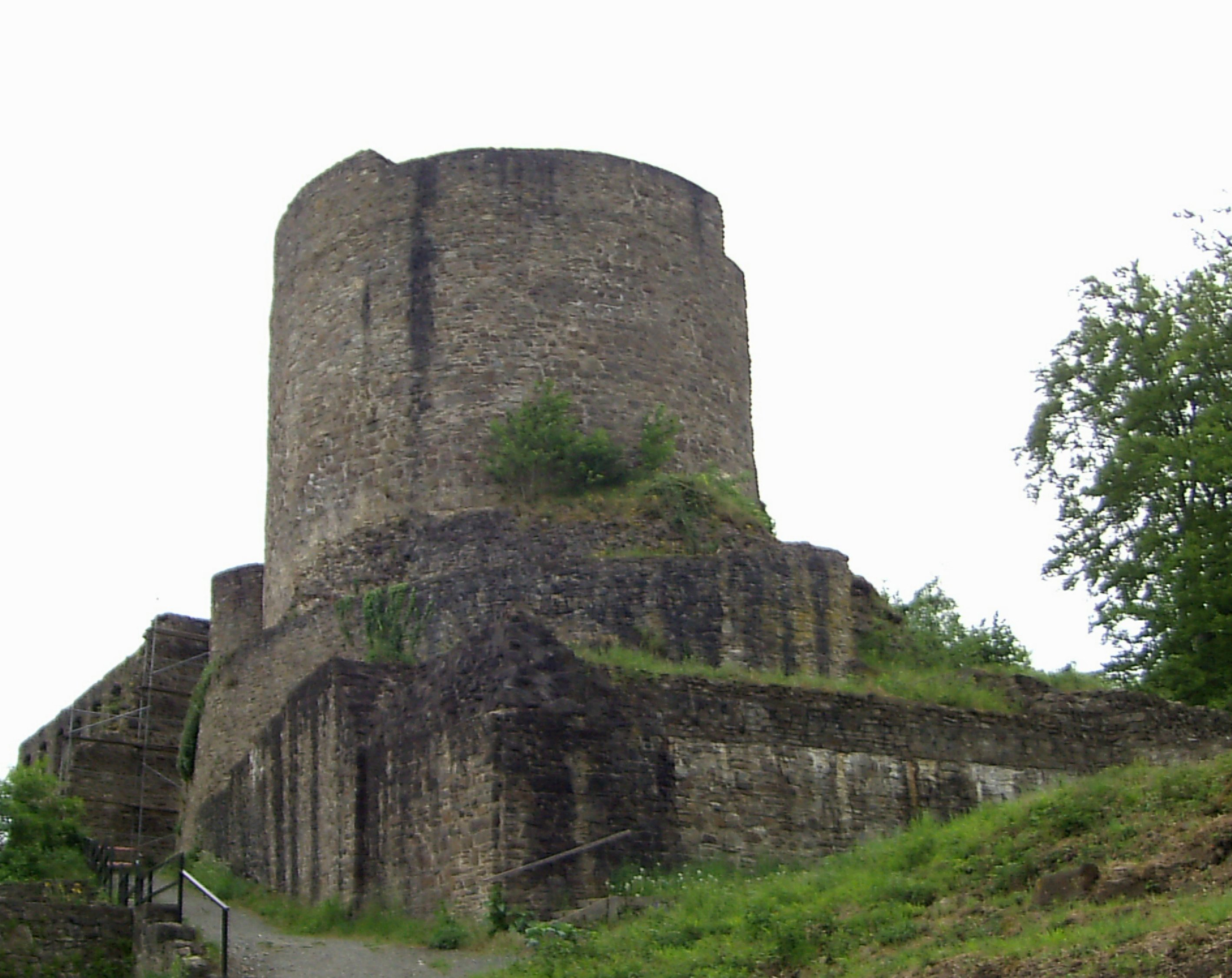 Bergfried der Burg Windeck, Nordrhein-Westfalen, Deutschland